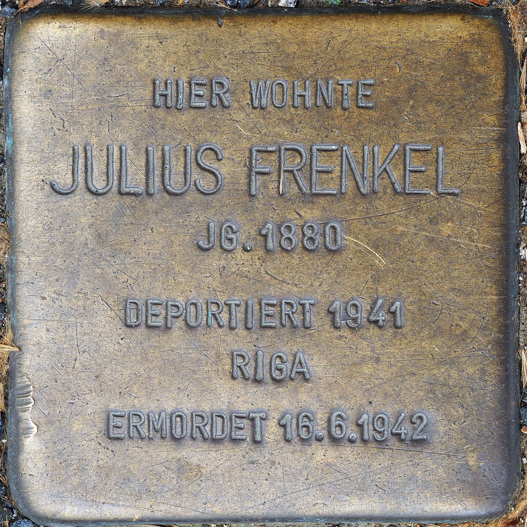 Stolpersteine MG: Frenkel, Julius